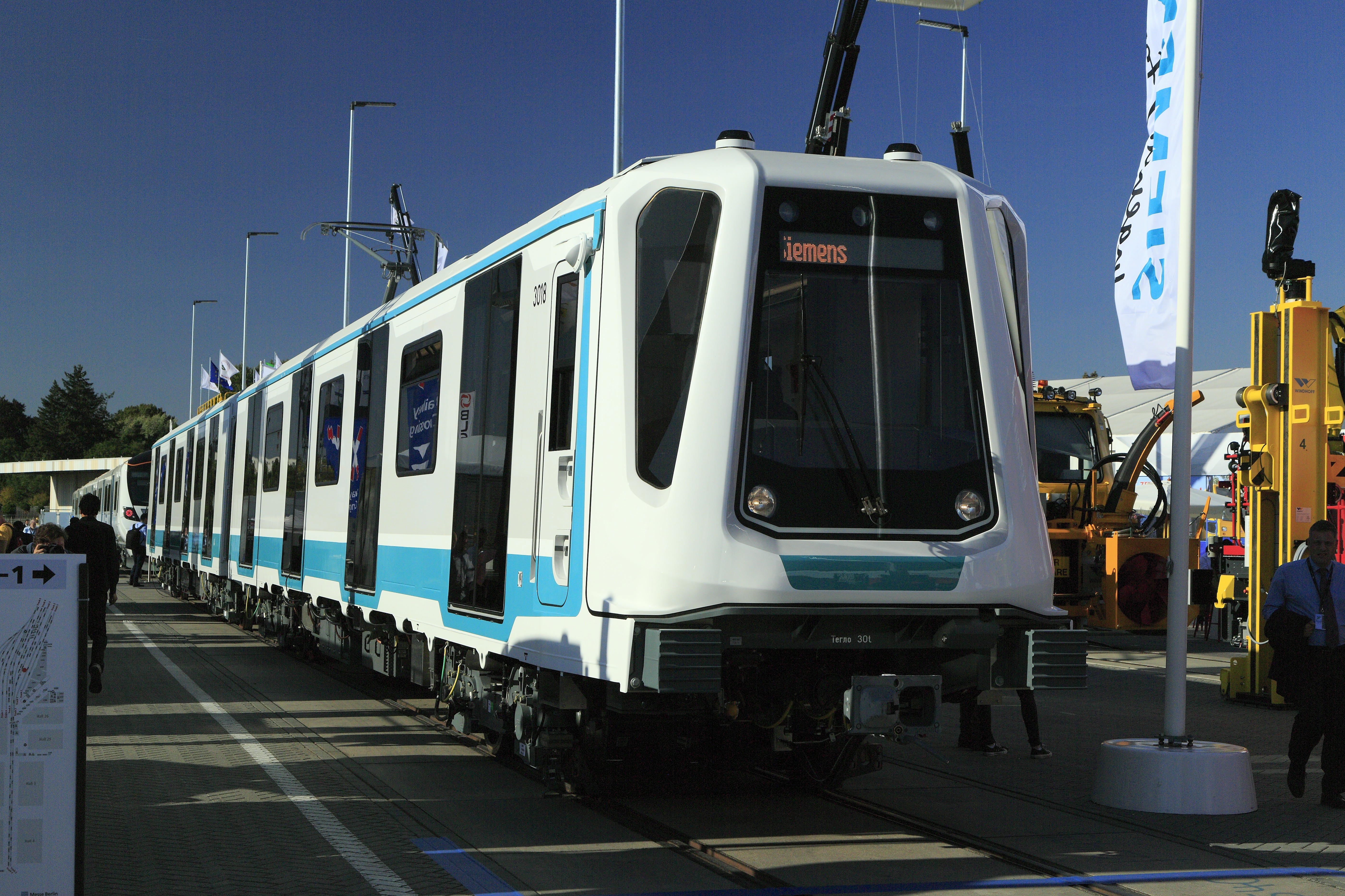 Triebzug für die zum Aufnahmezeitpunkt noch im Bau befindliche U-Bahn-Linie 3 Vraždevna–Ovča kupel. Die Strecke wird abweichend von den beiden bereits vorhandenen, die nach sowjetischen Normen gebaut wurden, mit Fahrleitung ausgerüstet. Die Dreiwageneinheiten sind mit nur 60 Metern Länge für eine U-Bahn-Strecke ungewöhnlich kurz, zumal im Lieferzustand auch keine Vielfachsteuerung vorgesehen ist. Ob es bei einem Netz mit nur drei Linien sinnvoll ist, technisch völlig unterschiedliche Parameter zugrundezulegen, wird die Zukunft zeigen.